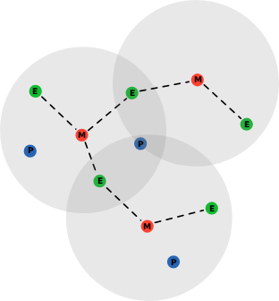 Scatternet Bluetooth Auteur : Utilisateur:THA-Zp